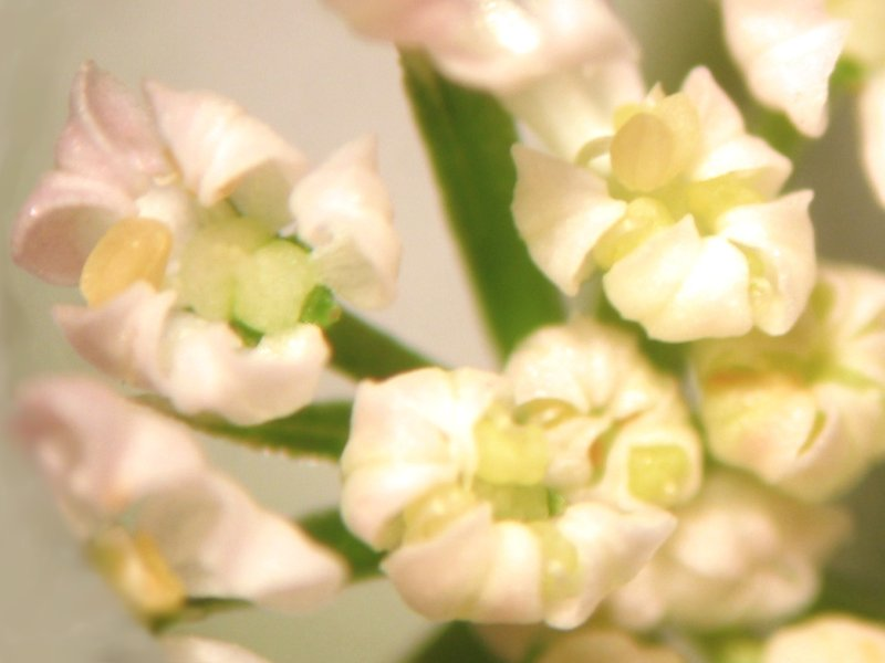 Detailaufnahme der Blüte (etwa 32-fache Vergrößerung) des Sumpf-Haarstranges Peucedanum palustre